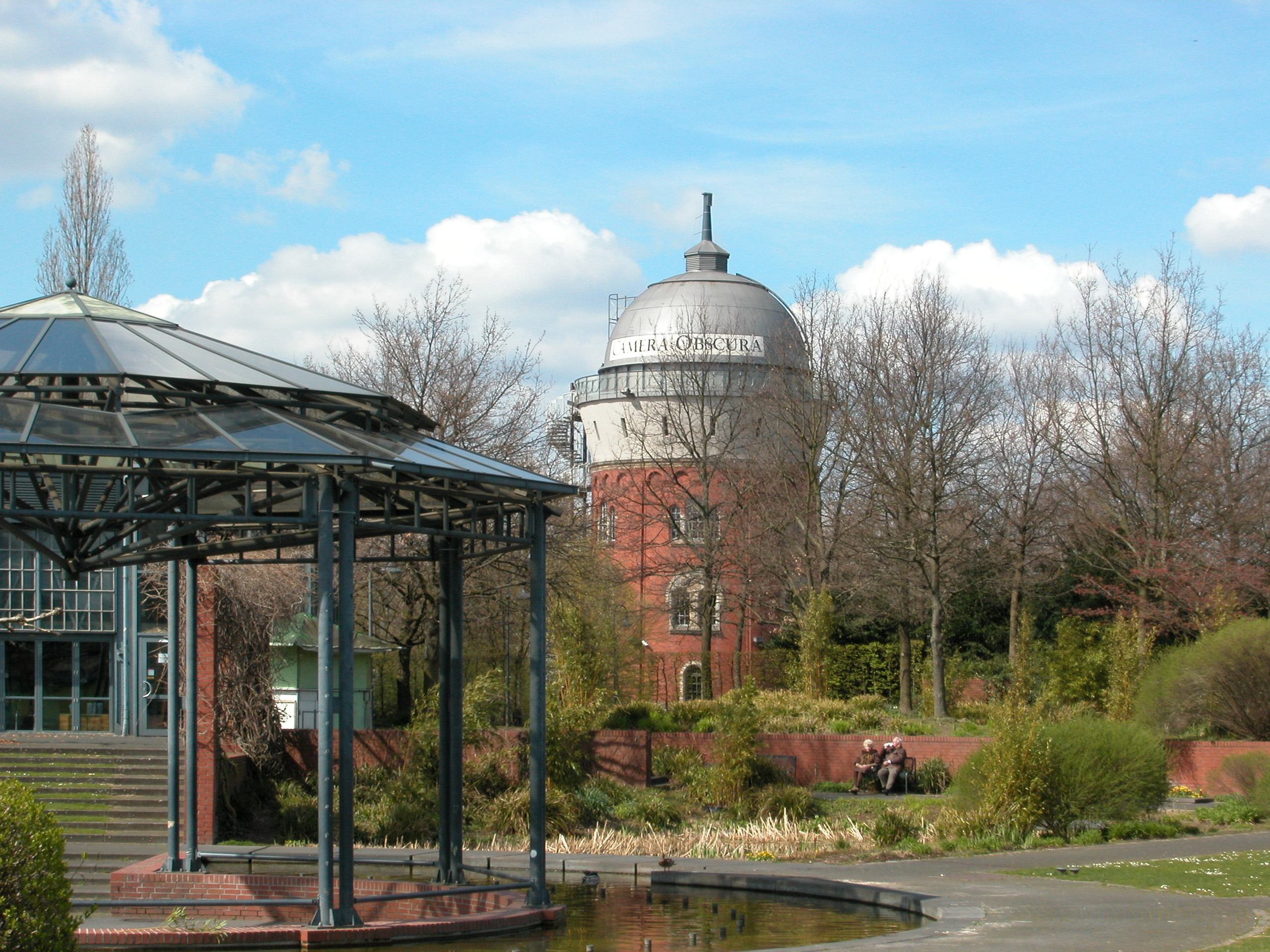 Blick nach Nord-West vom Ringlockschuppen zur Camera obscura in Mülheim an der Ruhr Standortkoordinaten: 51°25′40.89″N 6°52′9.86″E / 51.428025°N 6.8694056°E